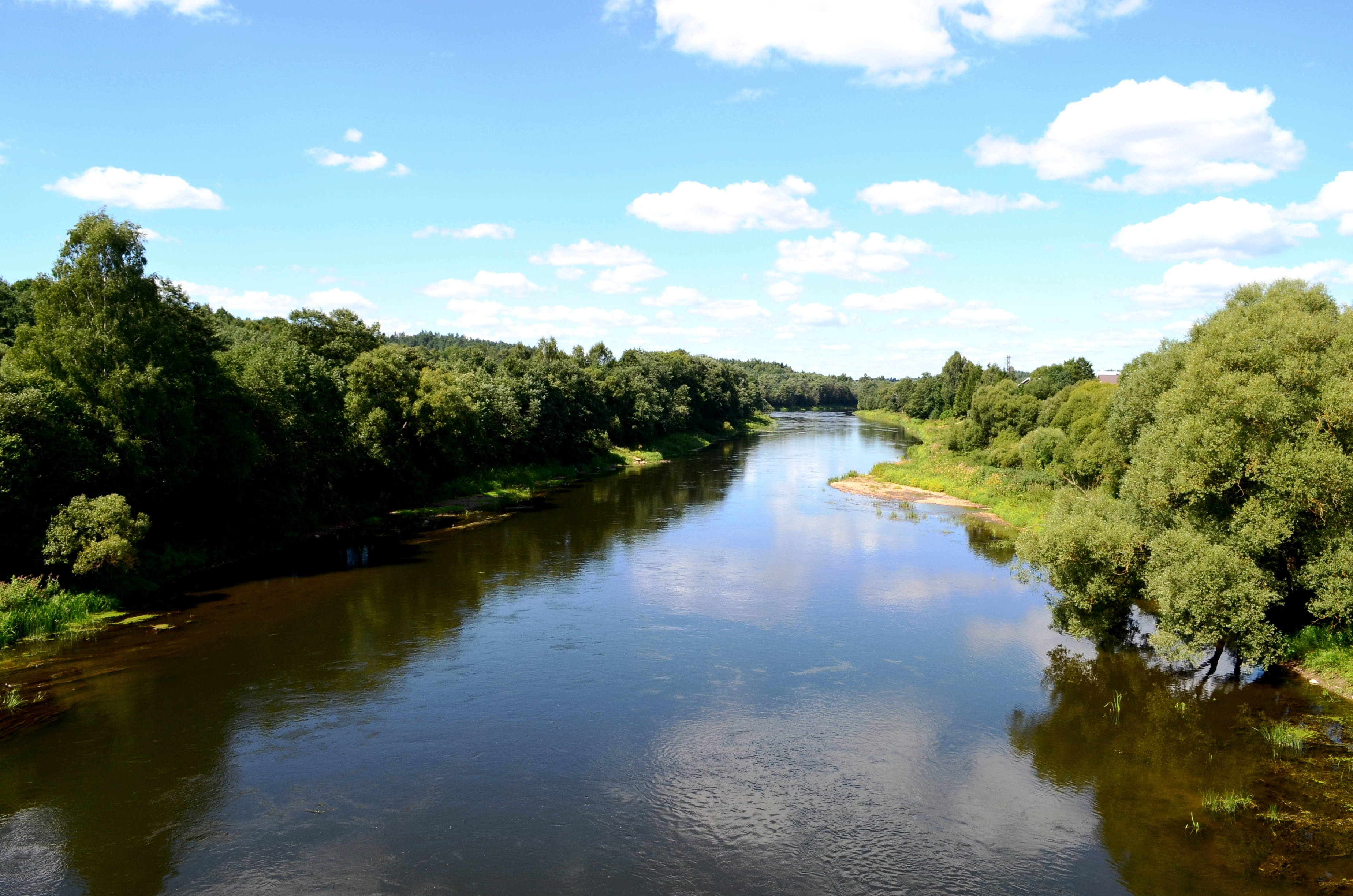 Neris nuo Nemenčinės tilto, Vilniaus raj.